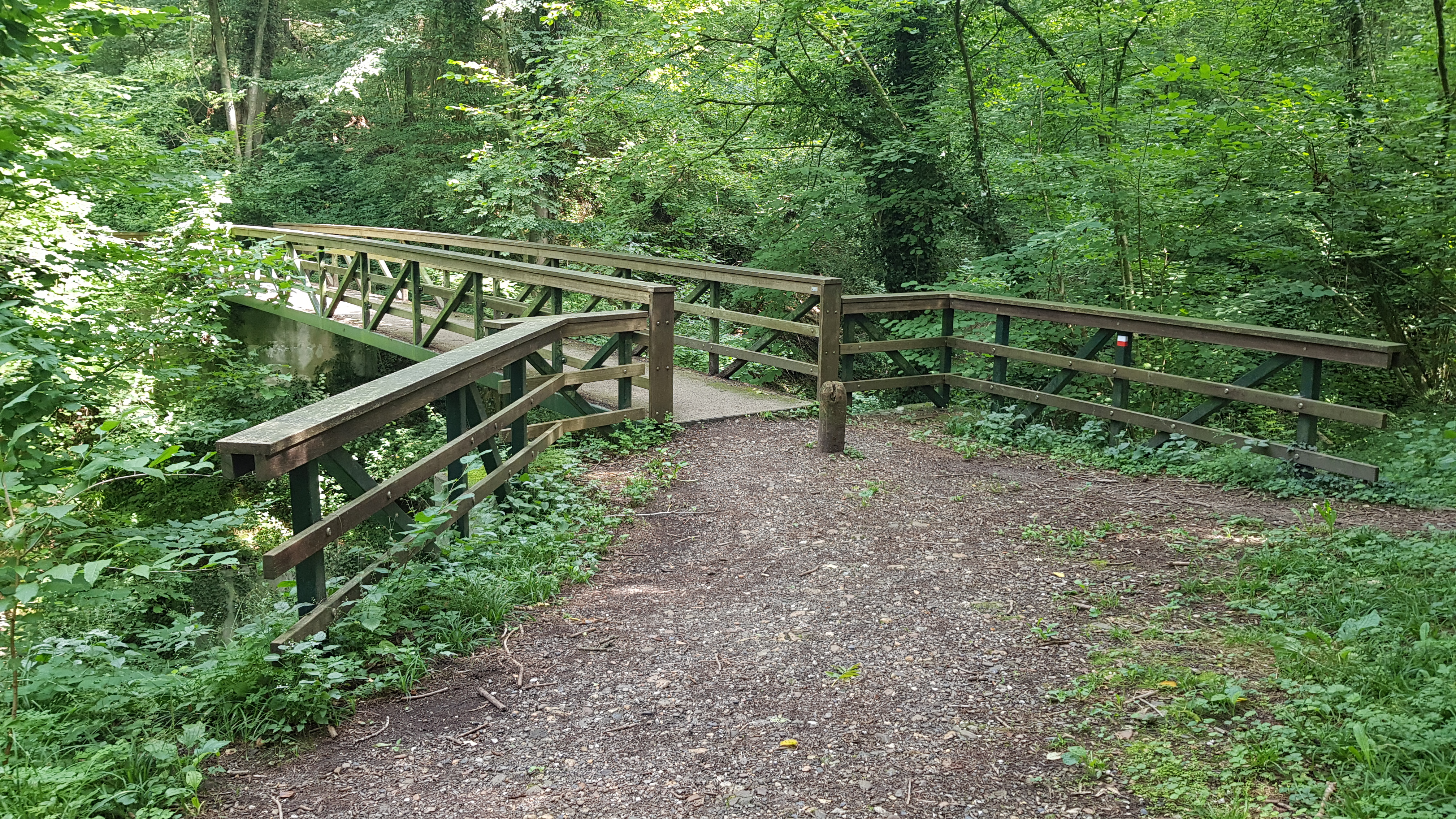 Scheggelderbrug over de Scheggelder Grub, Savelsbos, Nederland